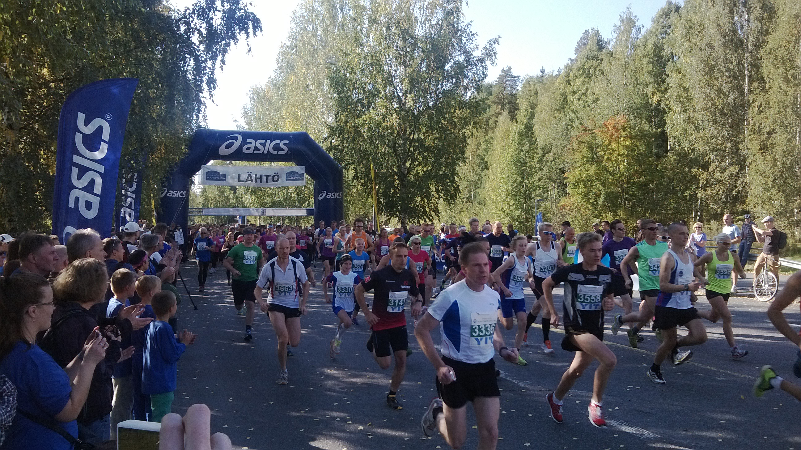 Jyväskylän Finlandia Marathon, 10 n lähtö Kuokkalan Graniitin edestä 14.9.2013